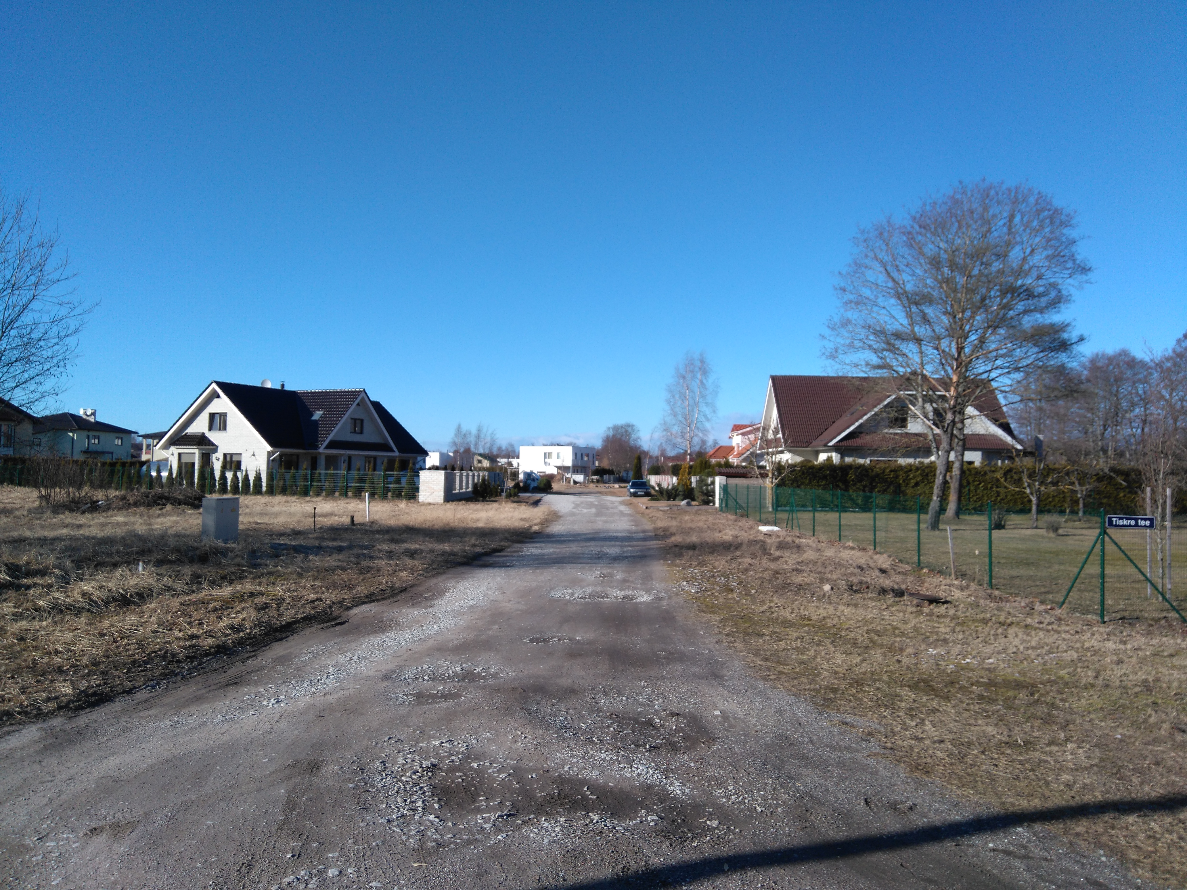 Maimu tänav